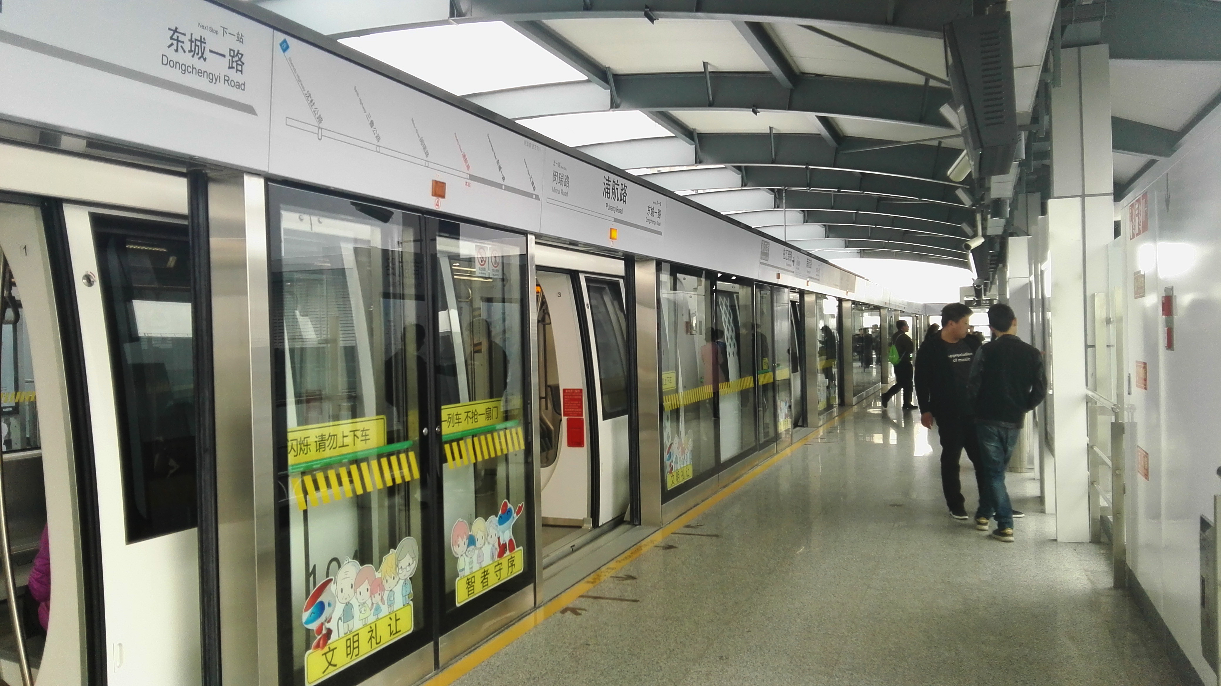 浦航路站汇臻路方向站台。